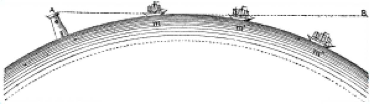 Preuve de la sphéricité de la Terre avancée par Pline l'Ancien (et non pas par Aristote, comme il est souvent dit. Numérisation basse résolution d'une figure parue dans le livre Voyages des Astronomes français à la recherche de la figure de la terre et de ses dimensions par l'Abbé J. Loridan (Desclée, de Brouwer et Cie, Lille, 1890). Eu égard à l'ancienneté de l'ouvrage, cette figure se trouve maintenant dans le domaine public et peut être utilisée librement.